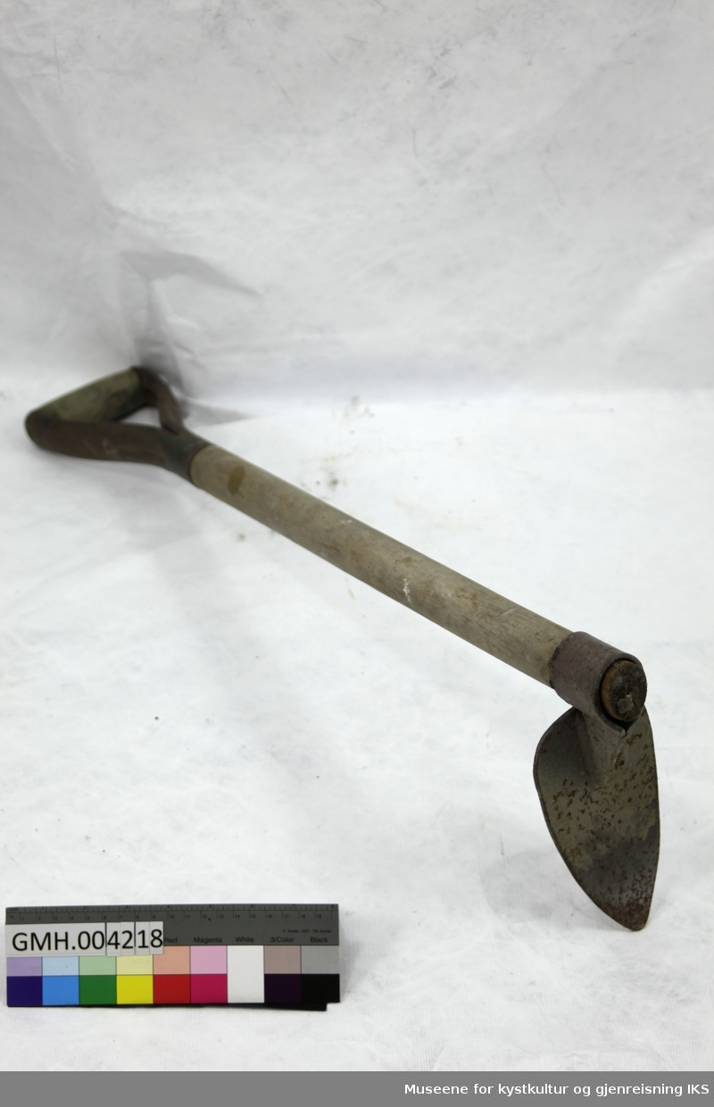 Gjenreisningsmuseet: Grevet har et V-formet håndtak som består av metall på sidene og tre der man griper med hånden. Metallet viser rester av grønn lakk. Bladet er kile- eller dråpeformet med avrundete hjørner. Skafthullet er formet oval og som en stropp og er sveiset mot bladet. Treskaftet sitter løst i grevhodet slik at det kan falle av.